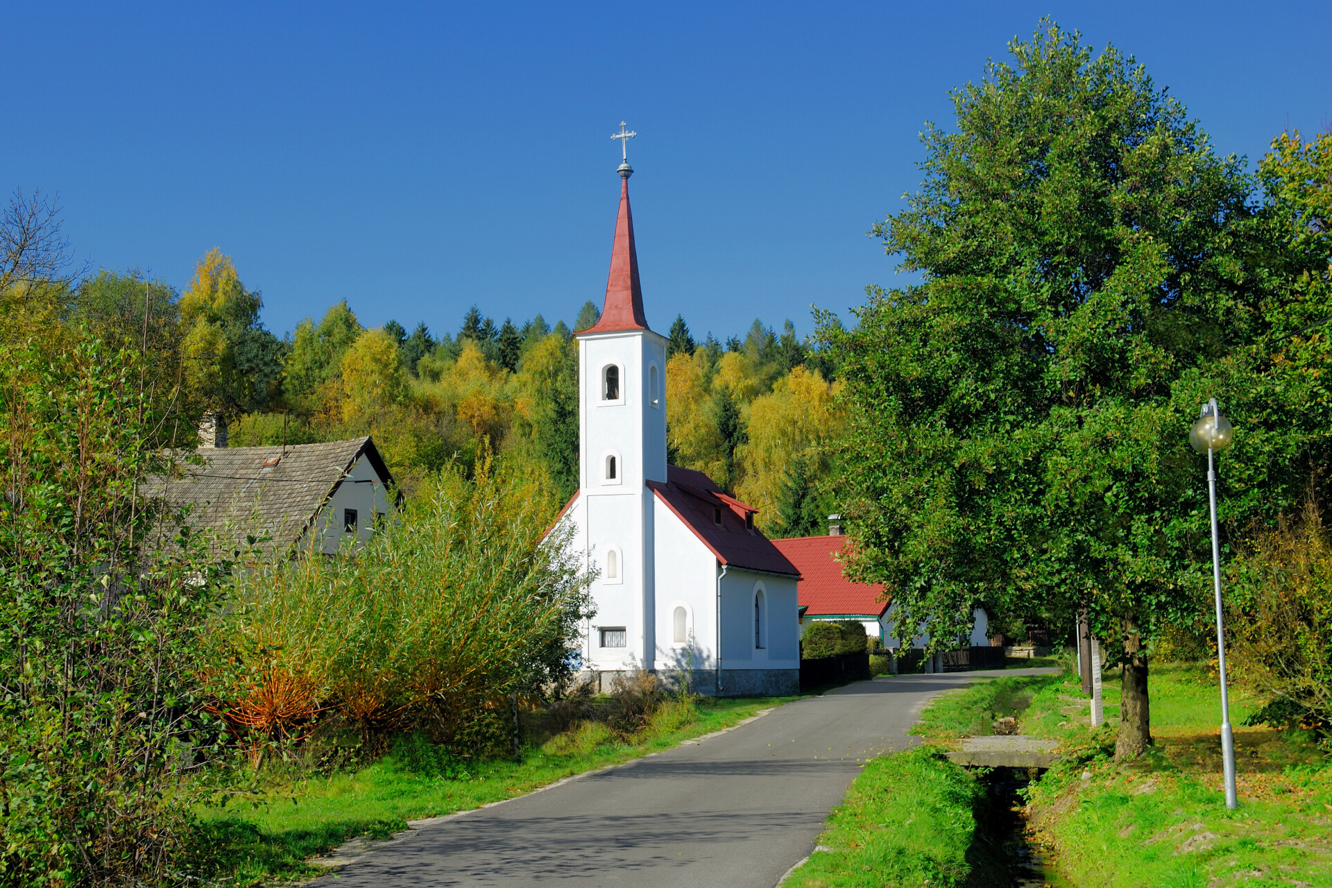 Kaplička ve Veclově